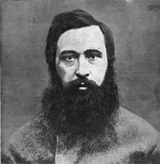 Пётр Владимирович Карпович (1874—1917) — российский революционер, террорист, член РСДРП, убийца министра народного просвещения Боголепова.